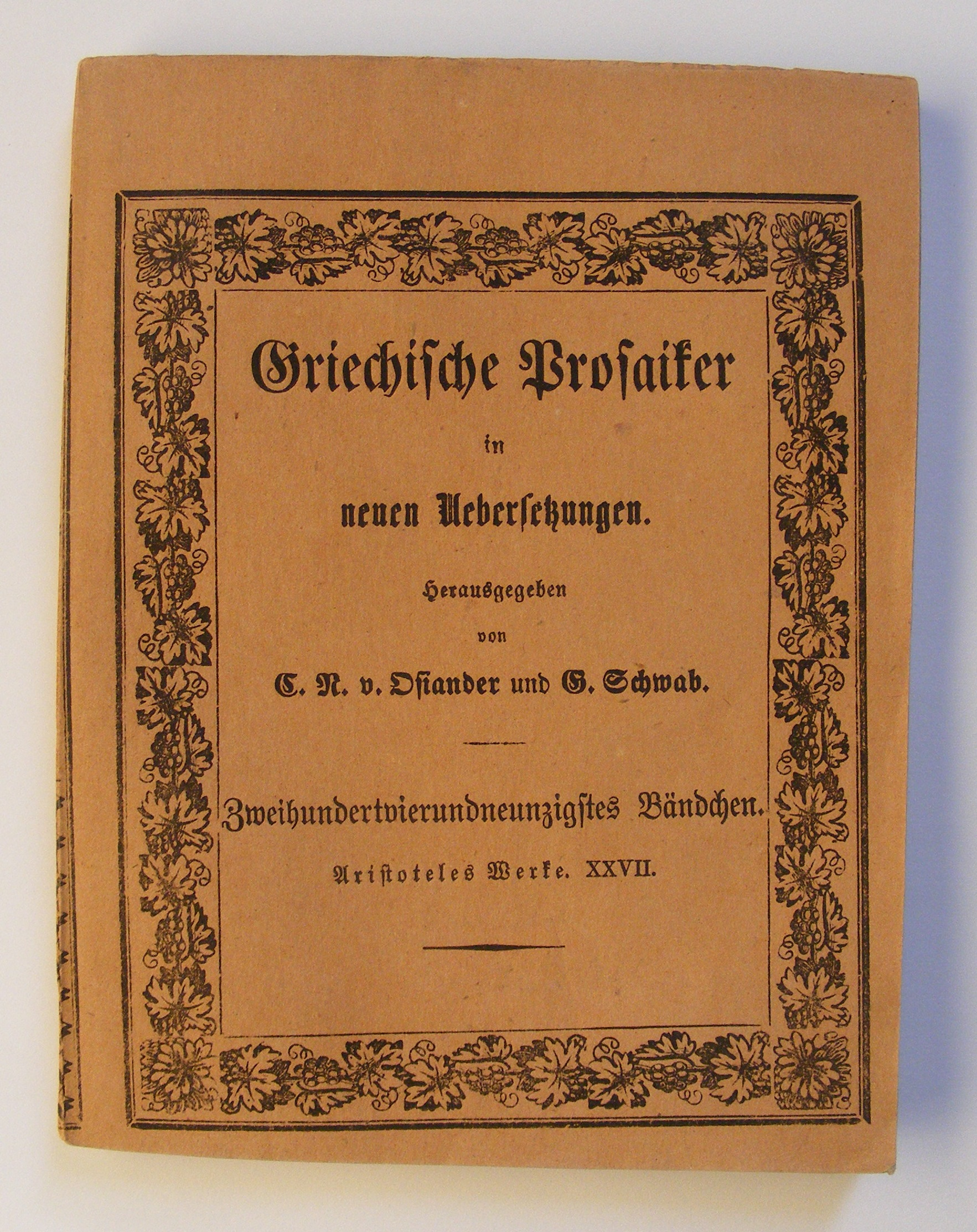 Typischer Umschlag des Interimseinbands der Reihe Griechische Prosaiker in neuen Uebersetzungen aus dem Verlag J. B. Metzler, hier das 294. Bändchen, Aristoteles, Eudemische Ethik, übersetzt von Julius Rieckher, Stuttgart 1858.